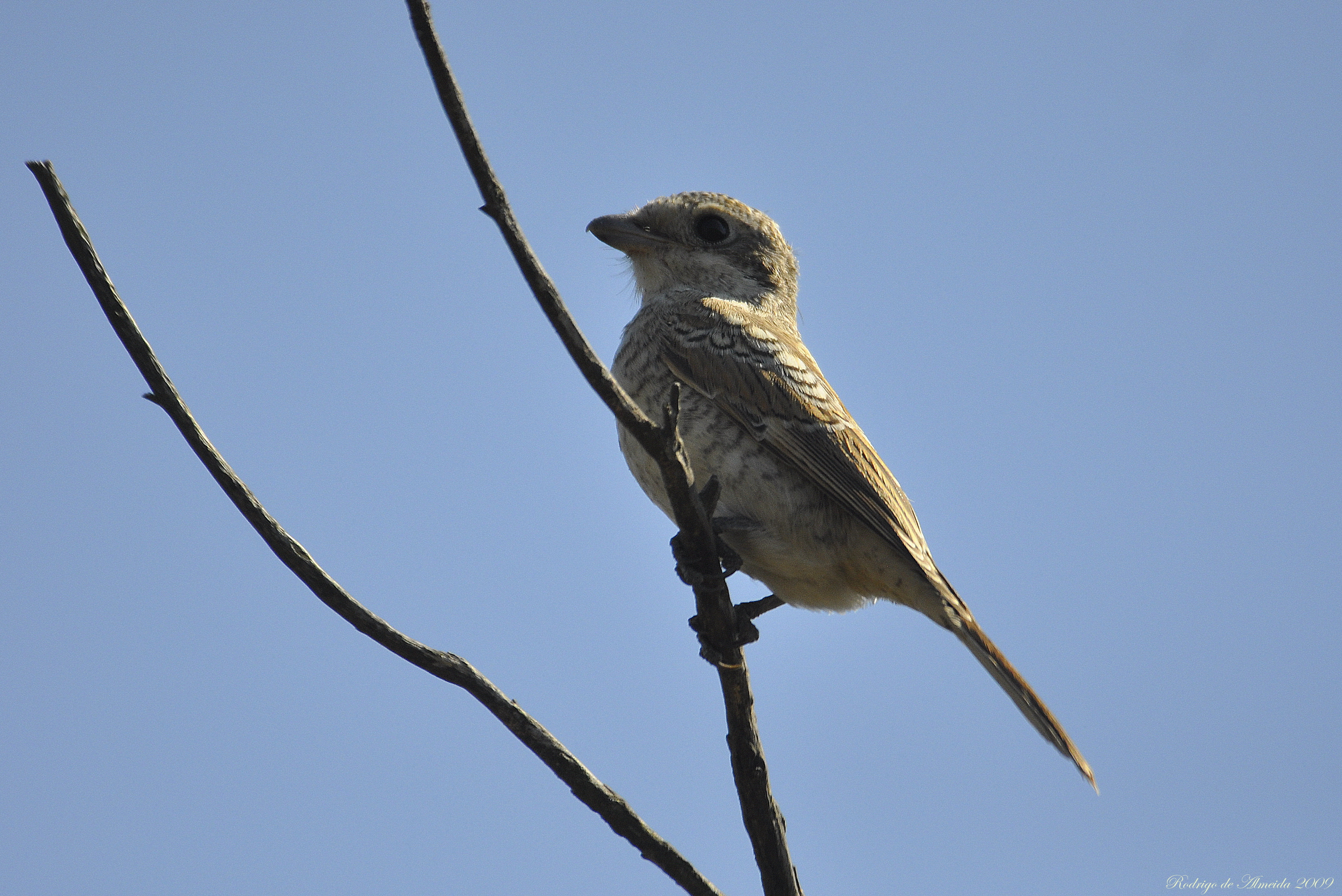 Nome Científico: Lanius senator